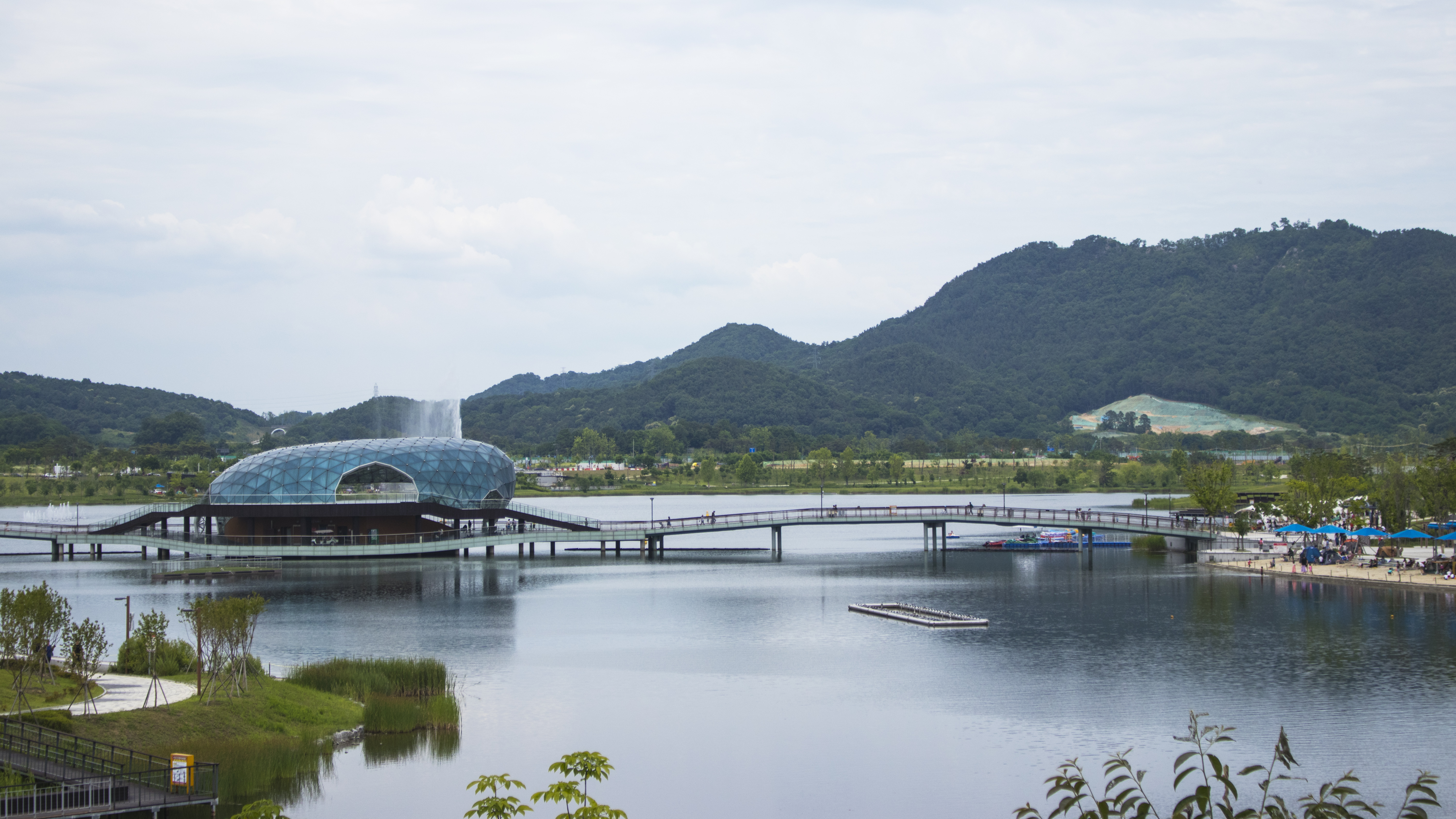 세종호수공원의 모습